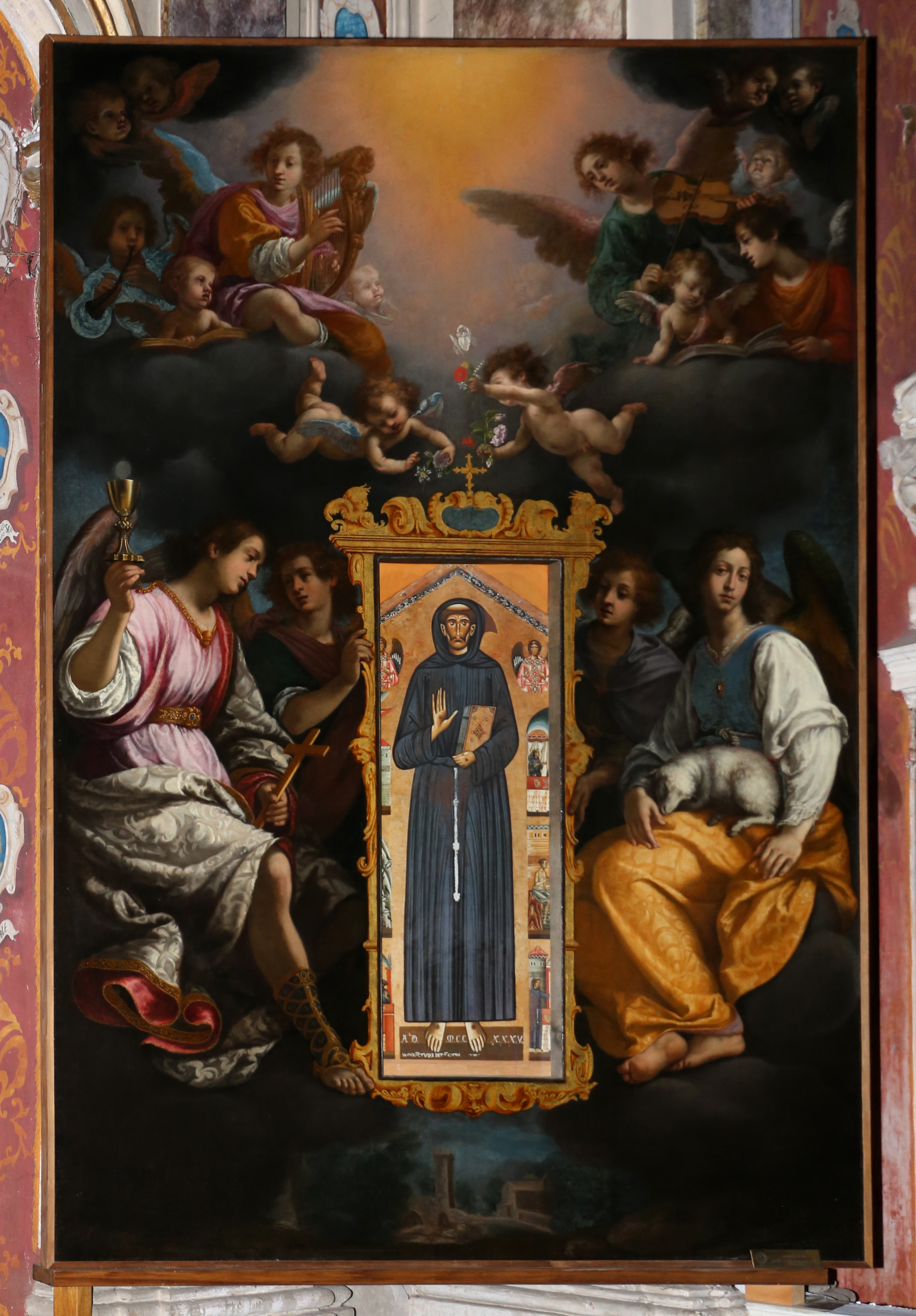 Chiesa di San Francesco This is a photo of a monument which is part of cultural heritage of Italy.